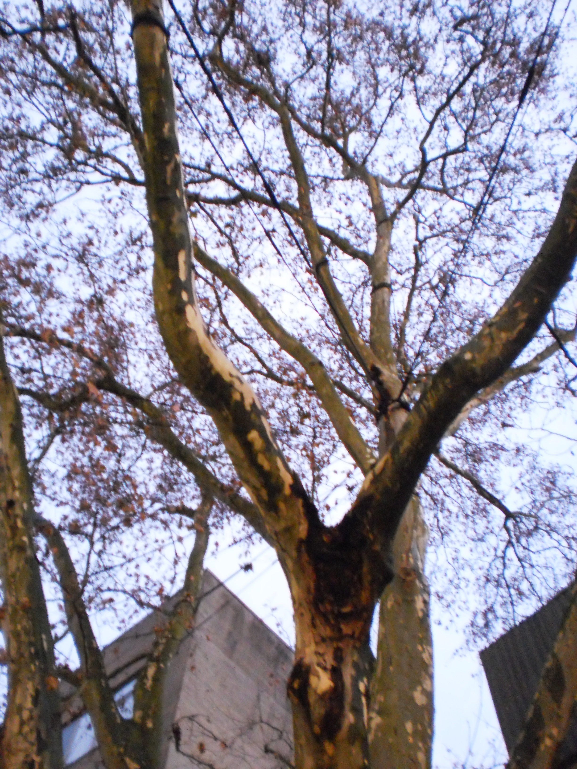 Astgabel von Platane mit Pilz (vermutlich Massariapilz/de-Wikipedia-Artikel:Massariakrankheit (ergänzungswürdig)) in Marburg Universitätsstrasse; ↓die Äste↓ sind schon länger wegen des Pilzbefalls gesichert (Kronensicherung durch Seile), der Baum, zumindest der Stamm an dieser vielbefahrenen Strasse wird als standsicher bezeichnet, wir müssen hoffen, dass er die nächsten Stürme übersteht. (4. Januar 2017).